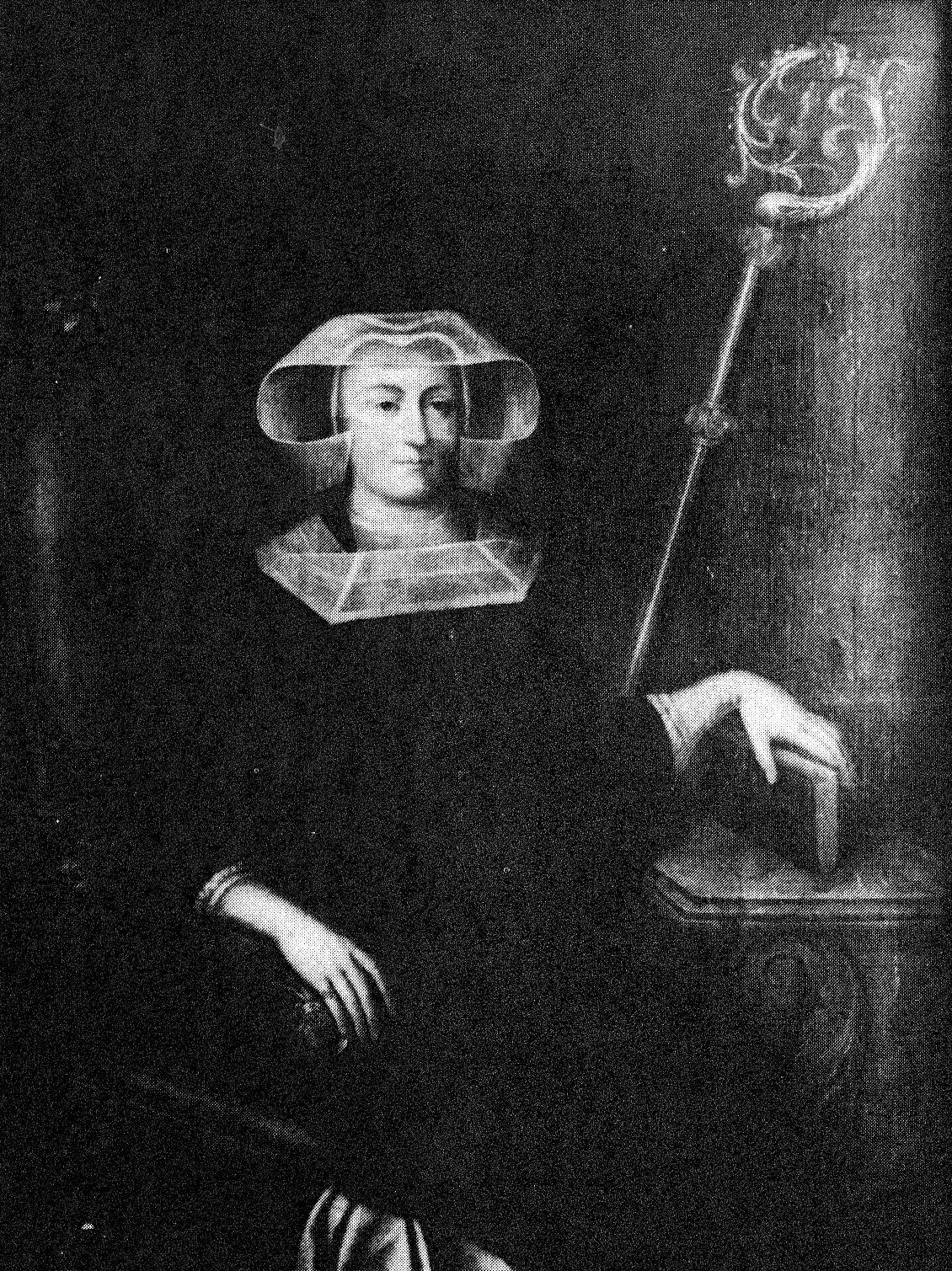 Anoniem. Maria Caecilia van Eyck, 30ste abdis van de Munsterabdij. 18de eeuw. Afkomstig uit F. P. J. Slenders. Waar het koepeldragend Munster rijst. Historisch overzicht betreffende de Onze Lieve Vrouwe Munsterkerk. Roermond: Stichting Jong Roermond, 1984. Schilder meer dan 70 jaar dood.